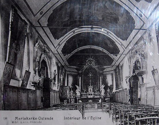 interior before 1914 ; Onze-Lieve-Vrouw-ter-Duinenkerk; Ostend, Belgium